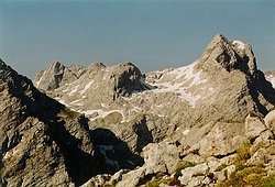 Pohled na Spitzmauer - 2446 m.n.m.